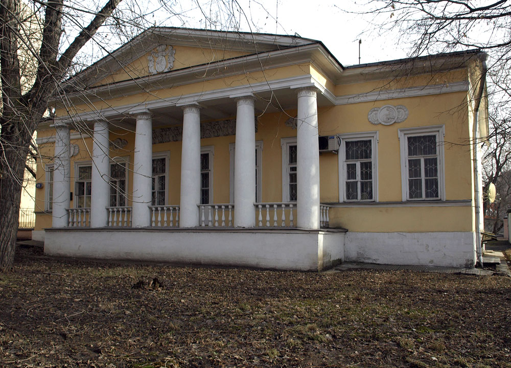 49, Ostozhenka, Moscow